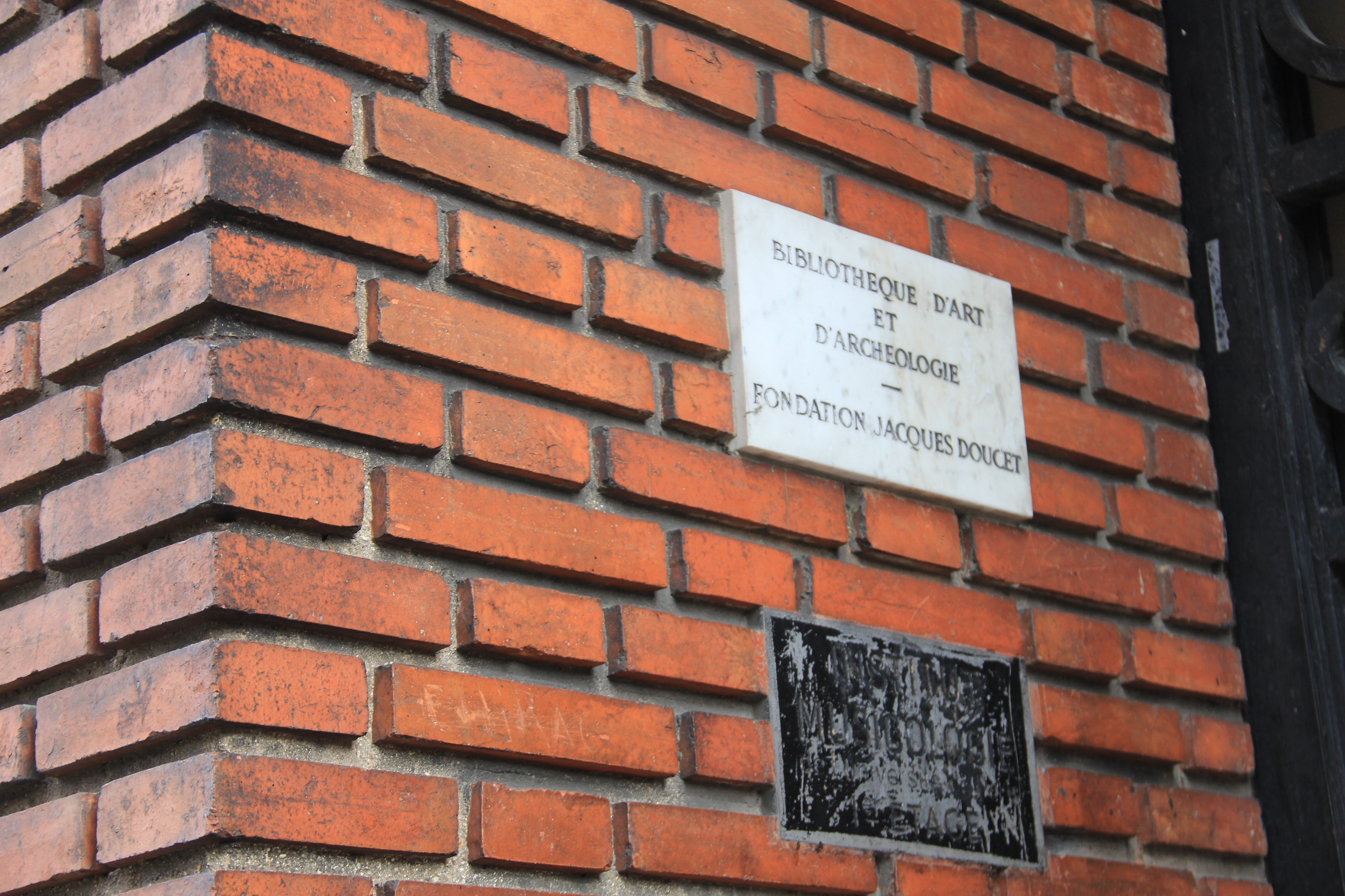 Bibliothèque d'art et d'archéologie, Paris.